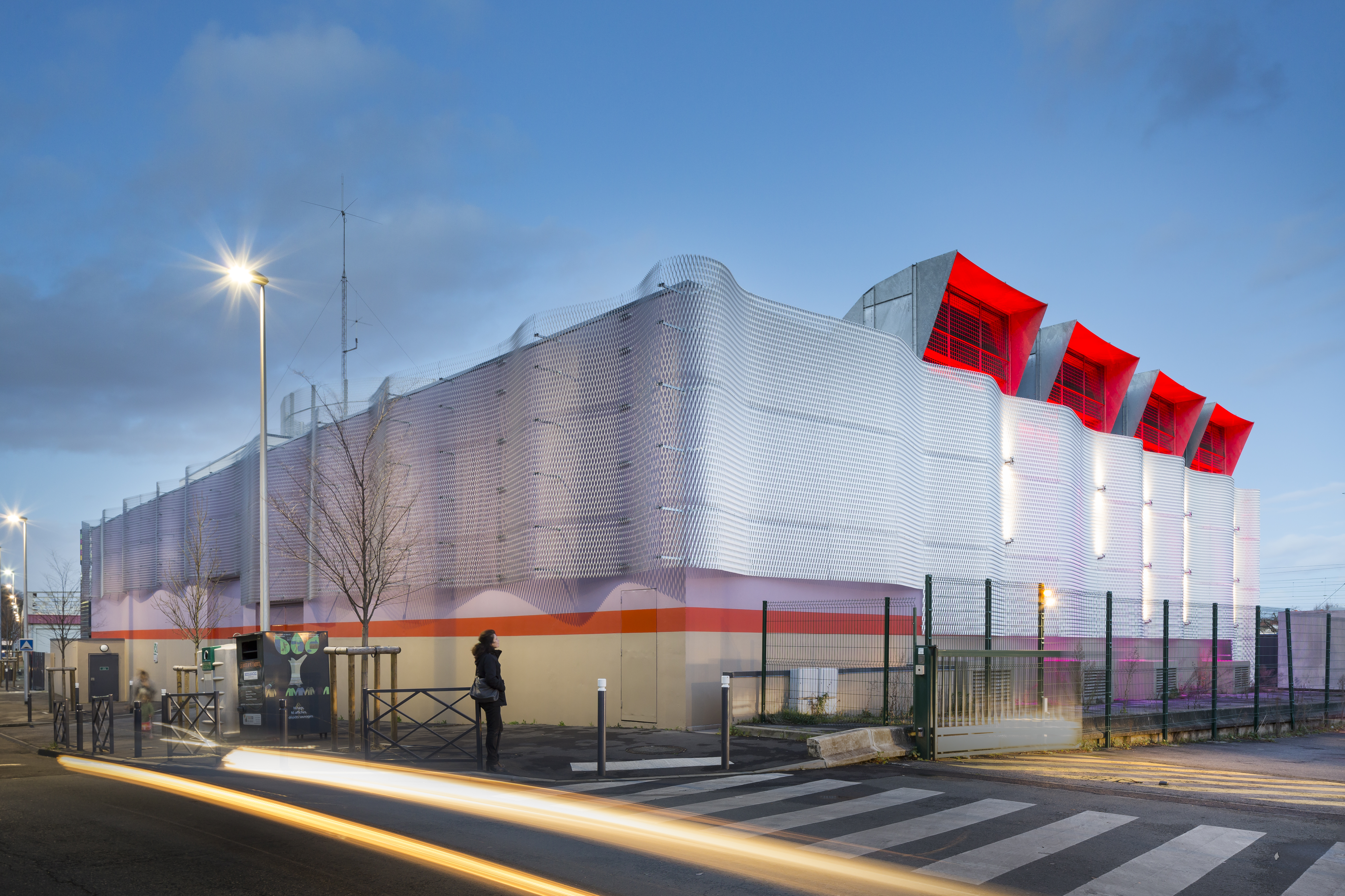 credit photo Photo-sergio-grazia